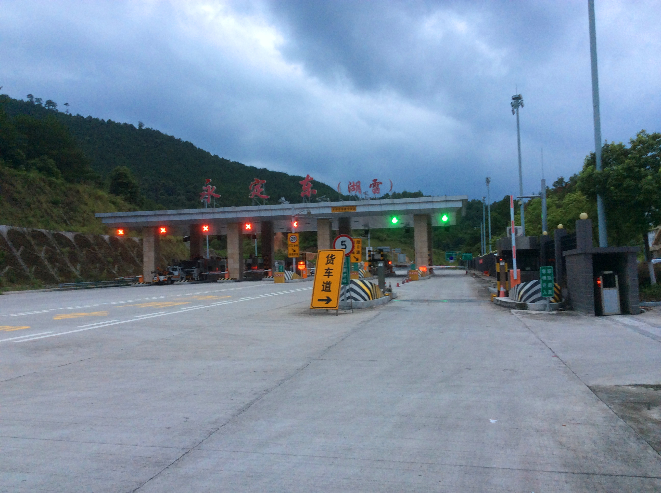 中文（中国大陆）: 永定东（湖雷）高速公路收费站